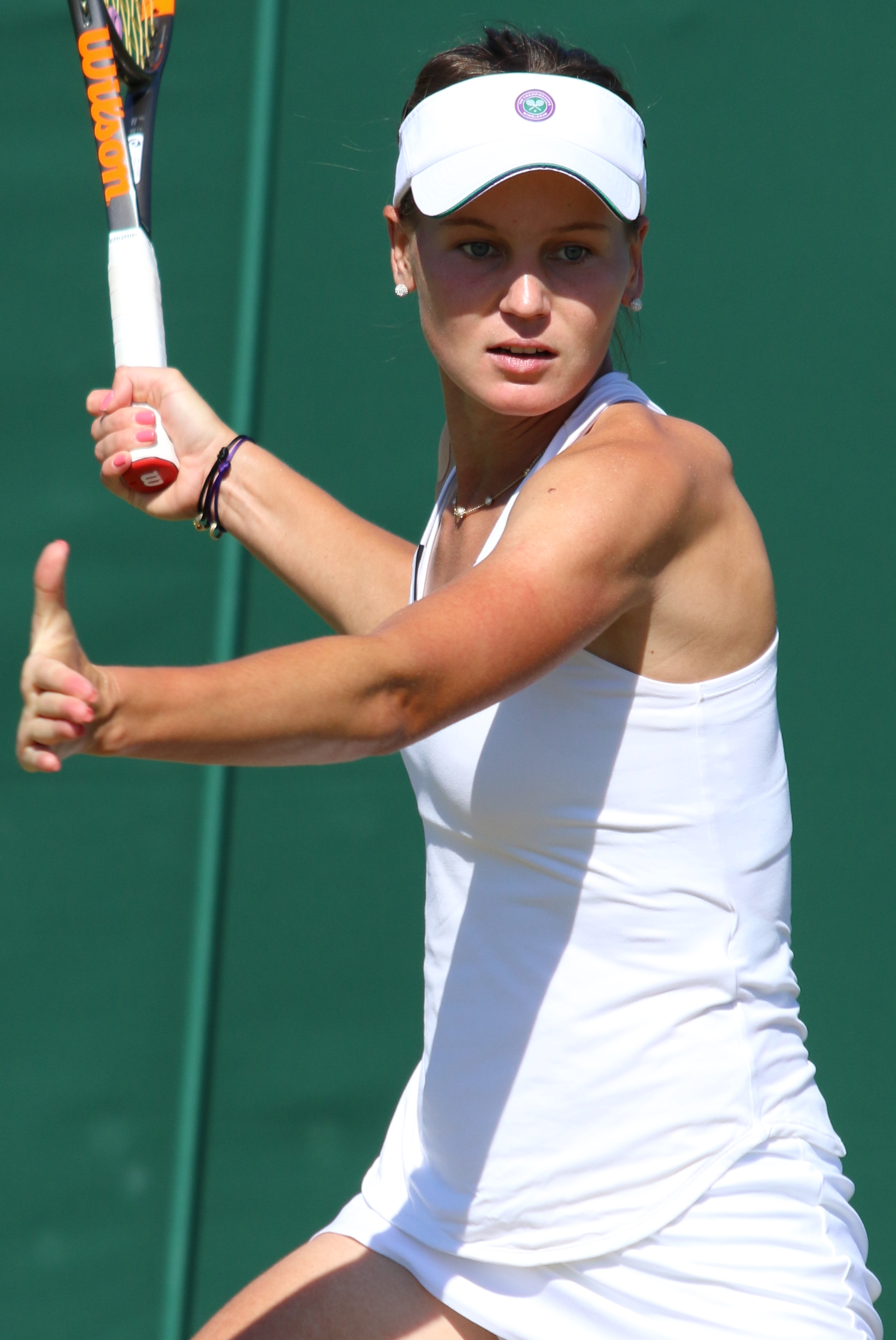 Kudermetova WMQ18 (13)